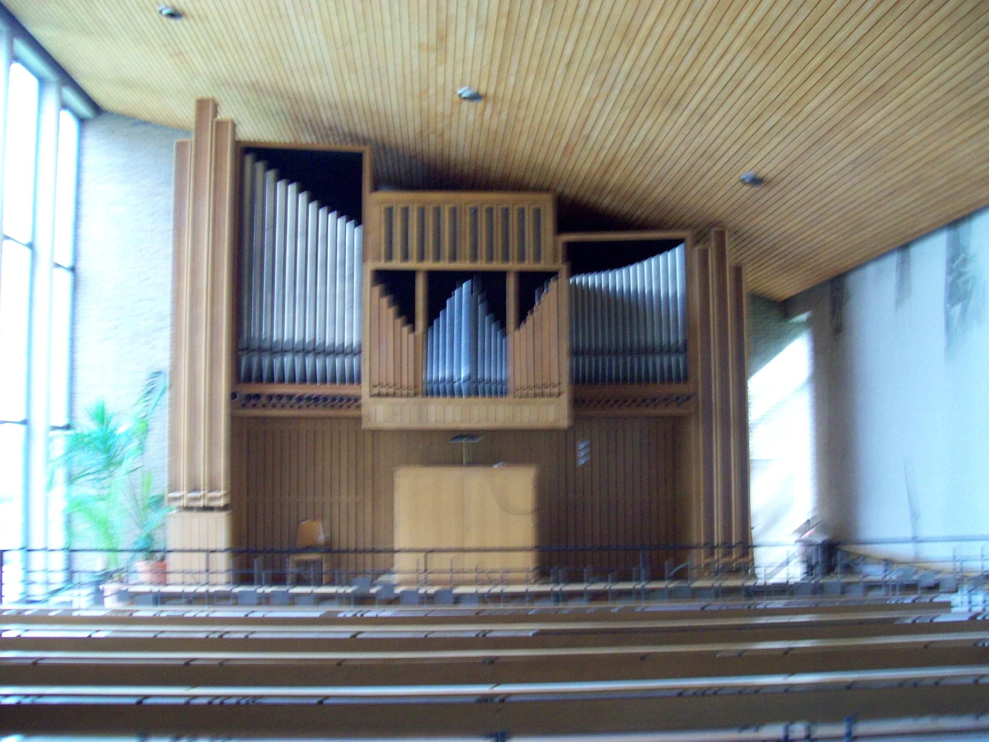 St. Pius Aschaffenburg Orgel